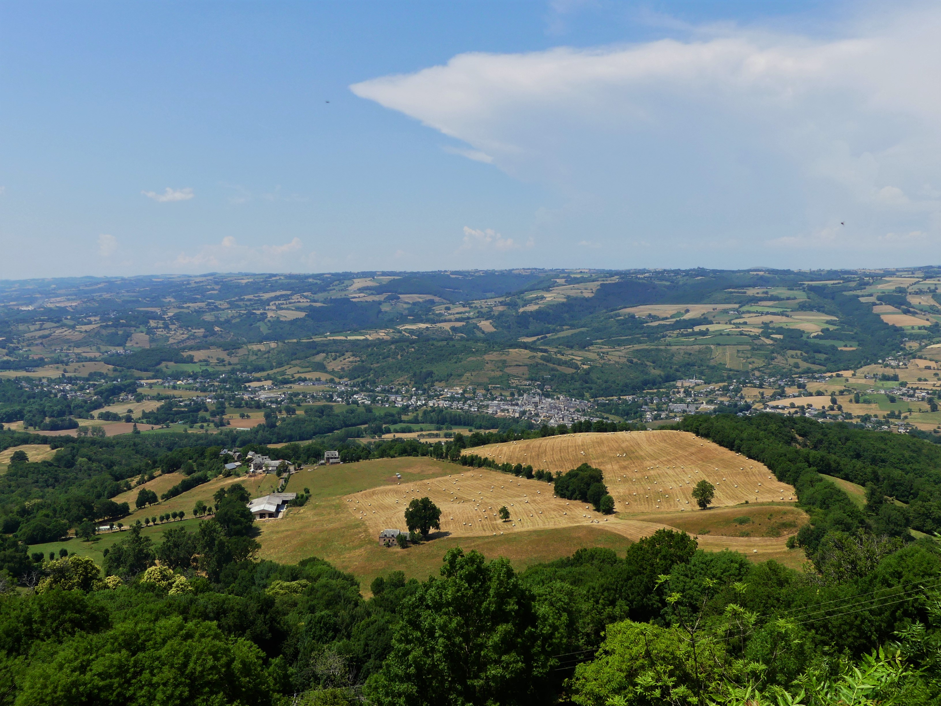 La vallée du Lot et le village de Saint-Côme-d'Olt ; vue prise depuis Roquelaure (Lassouts, Aveyron, France)